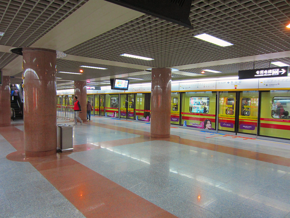 粵語: 東山口站1號線站台